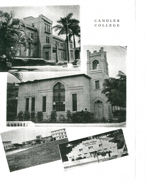 El edificio principal de Candler College, la Capilla , terrenos de deportes y el Gimnasio